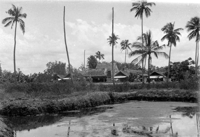 Negatief. Chinese tempel